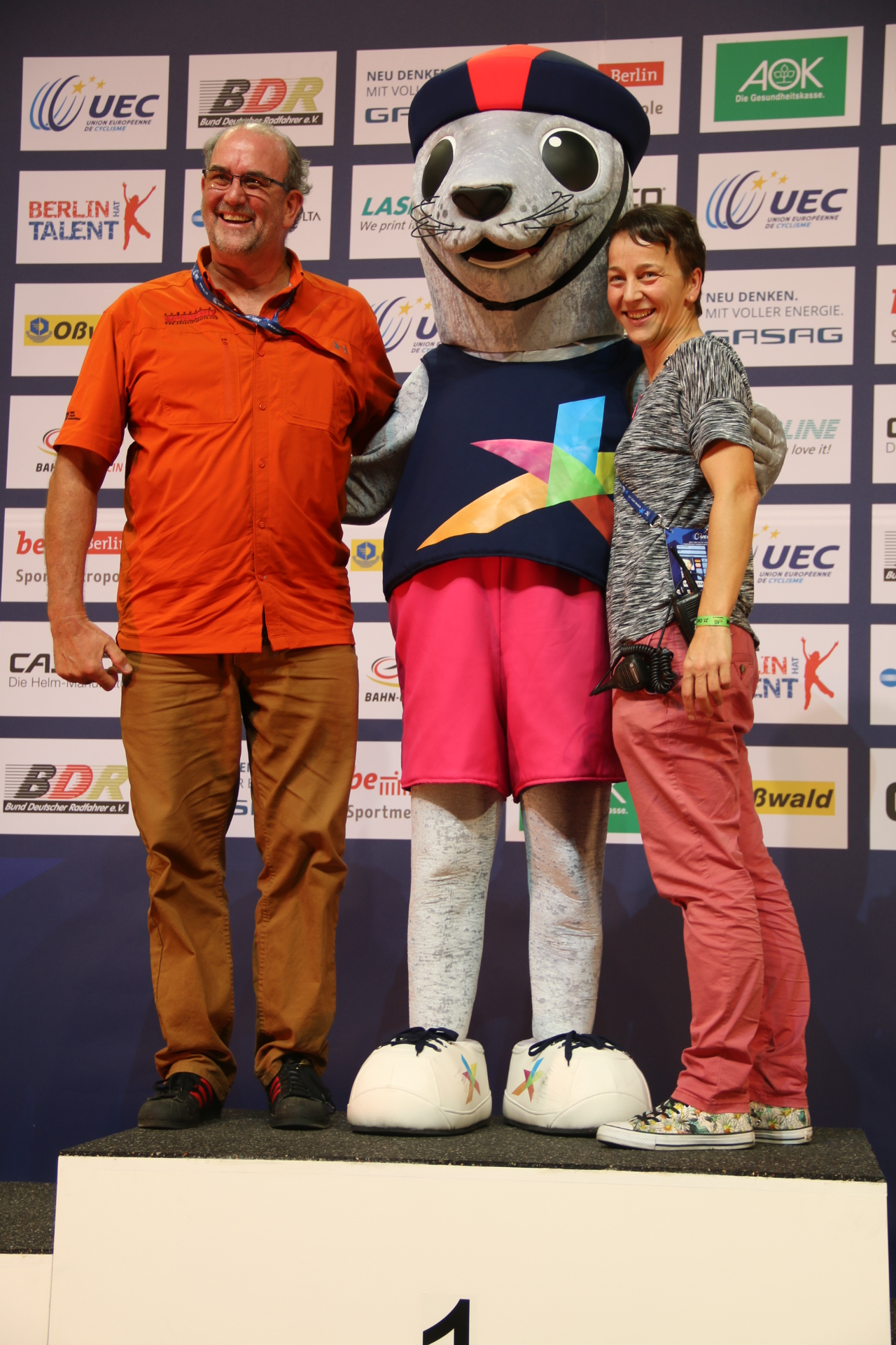 Seehund "Bonnie", Maskottchen der UEC-Bahn-Europameisterschaften 2018 in Glasgow, bei seiner Vorstellung in Berlin